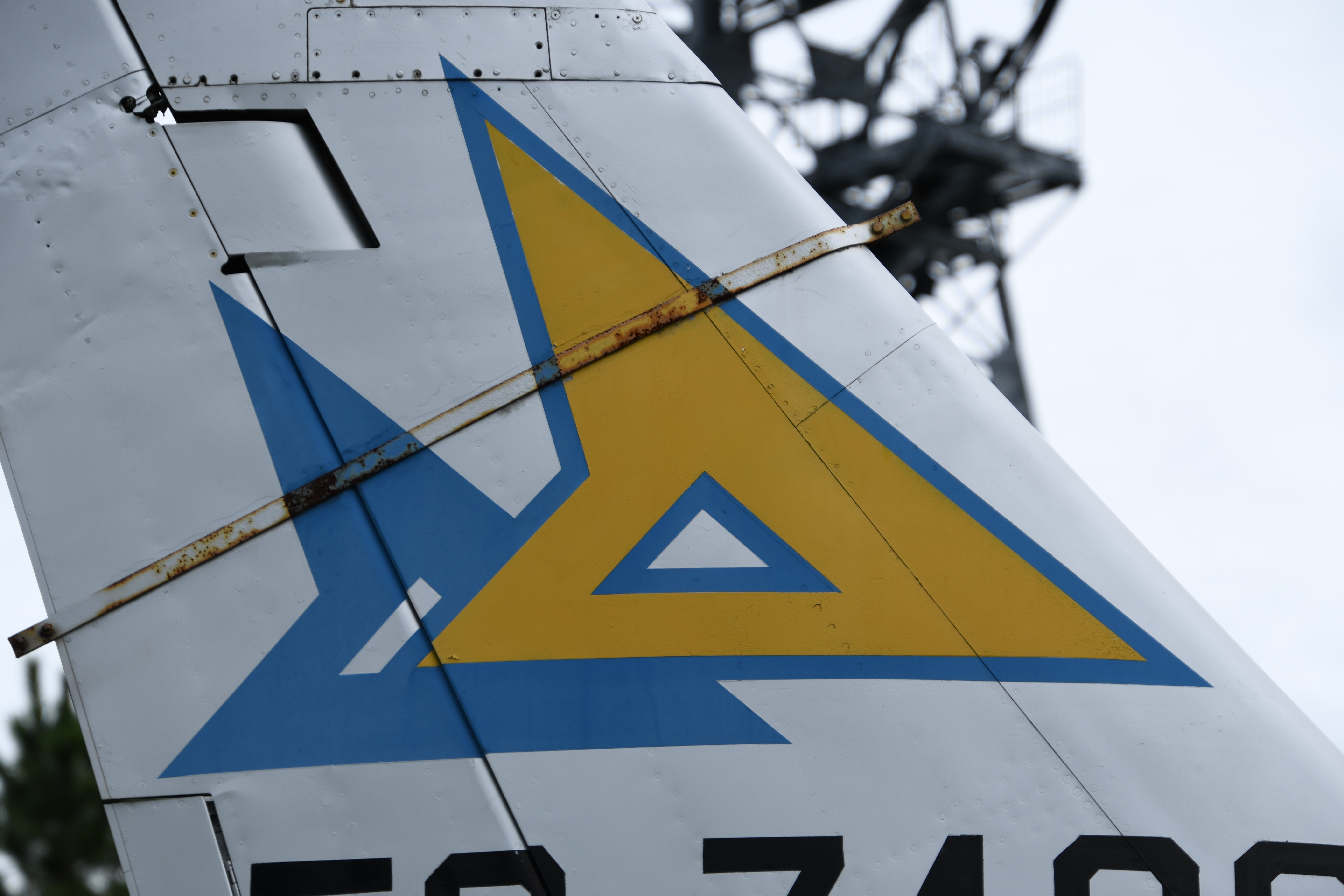 航空自衛隊 F-86F戦闘機（52-7408号機） 垂直尾翼に描かれた第4飛行隊部隊章。2018年9月17日 小松基地にて。